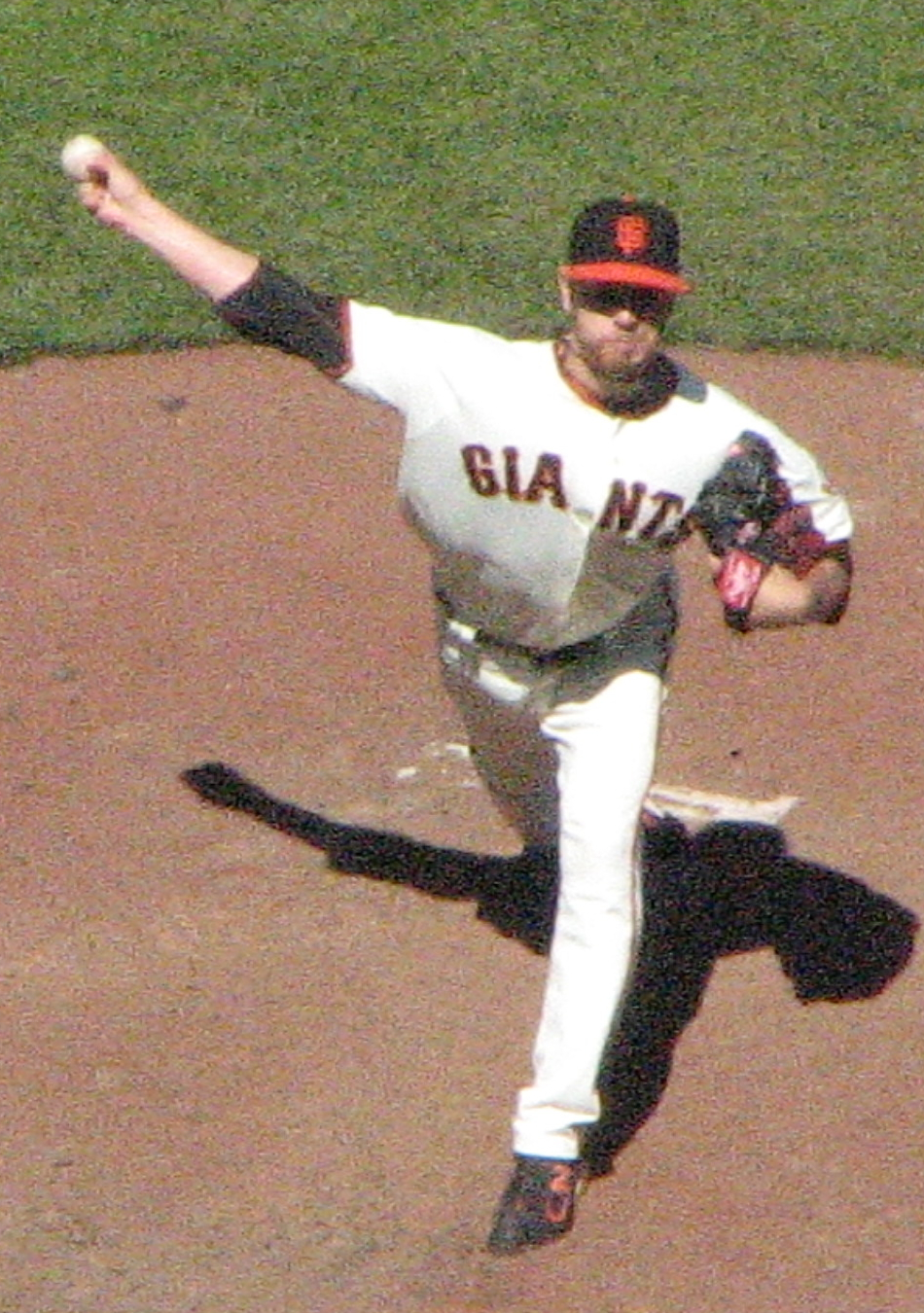 Steve Edlefsen